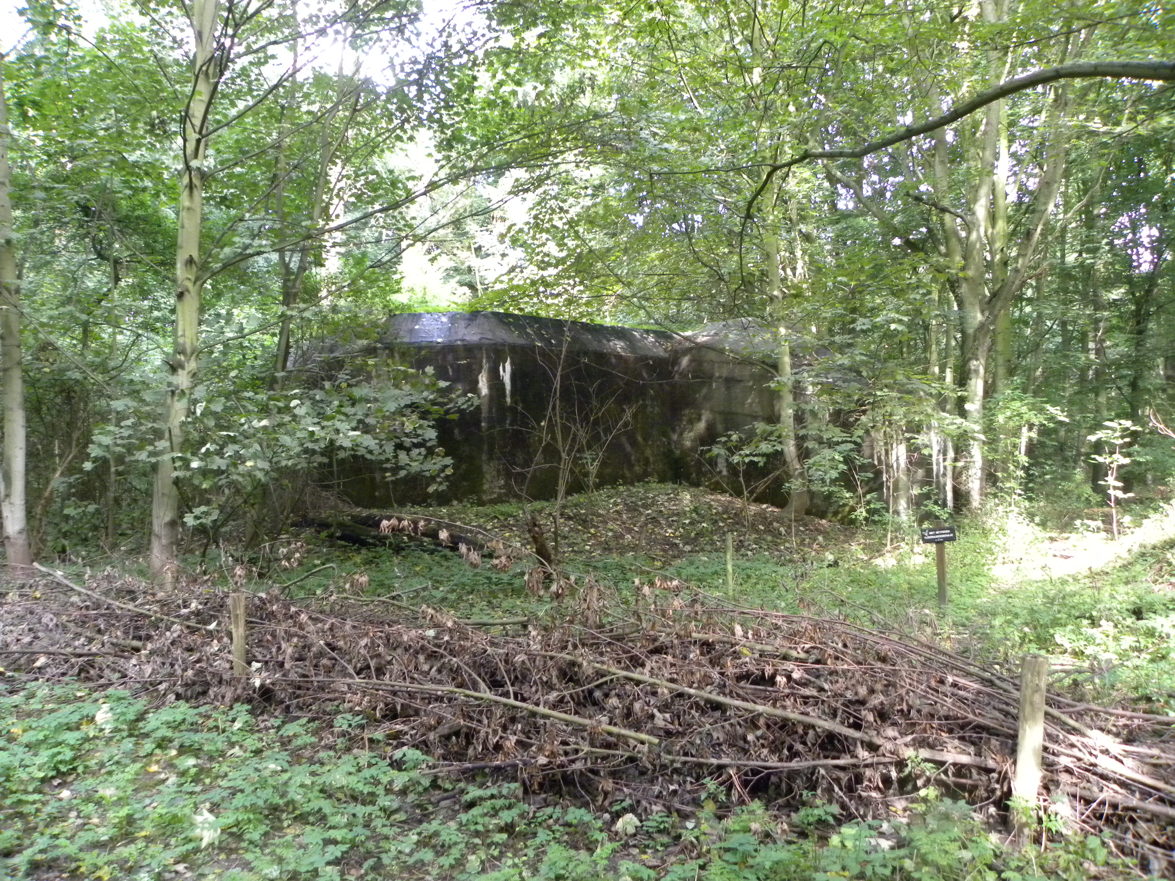 Bunker in het Staelduinse Bos, nu deel van het vleermuizenreservaat